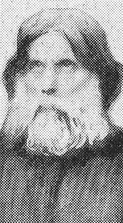 "Antoine le guérisseur".